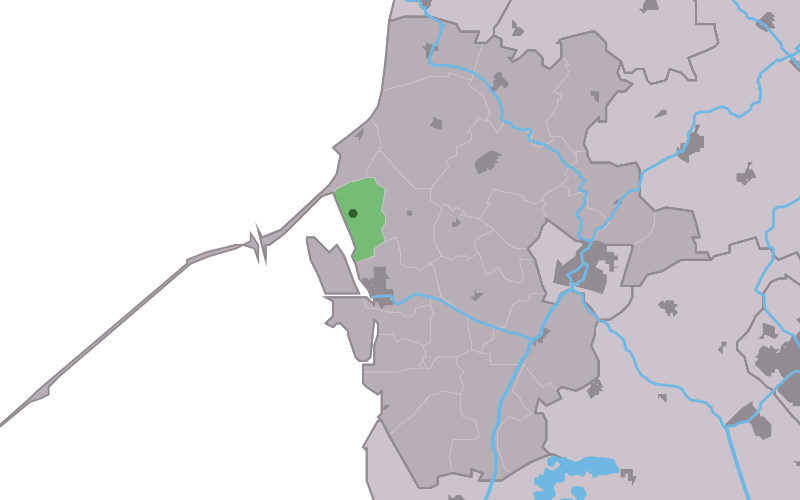 Kaartsje fan himrik fan Koarnwert